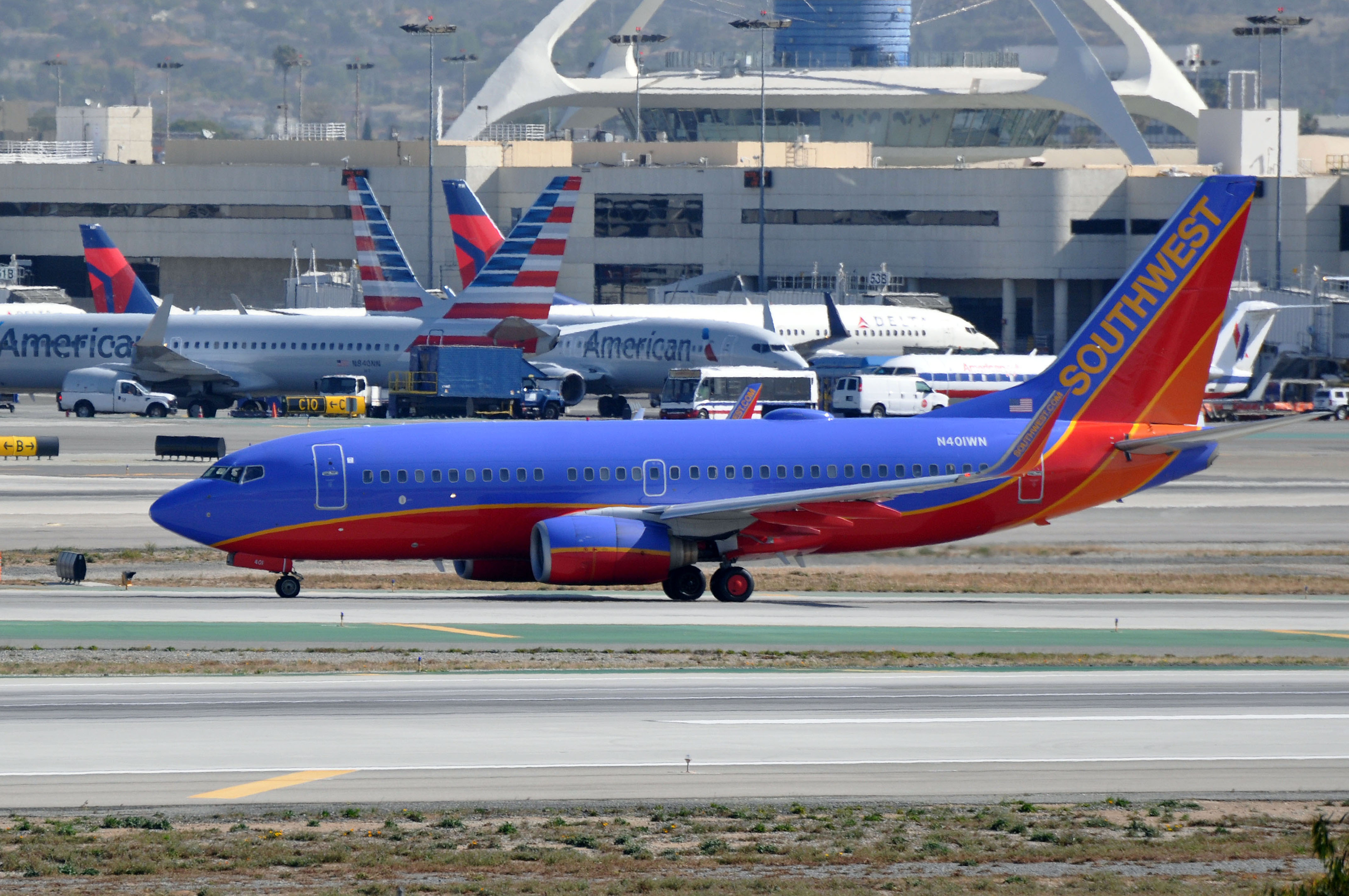 MSN 29813 LN 810 B737-7H4 / 737 / 737-700 SOUTHWEST AIRLINES LAX AIRPORT